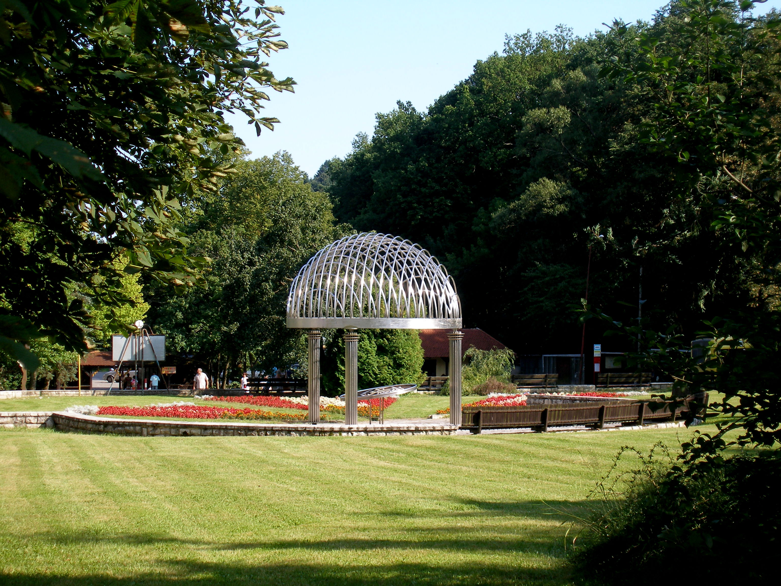 Bardejovské Kúpele, mesto Bardejov.